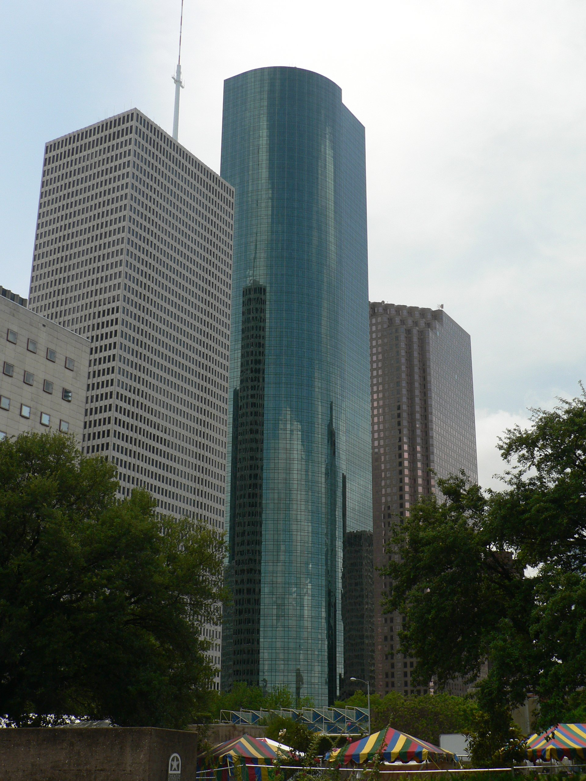 Wells Fargo Plaza